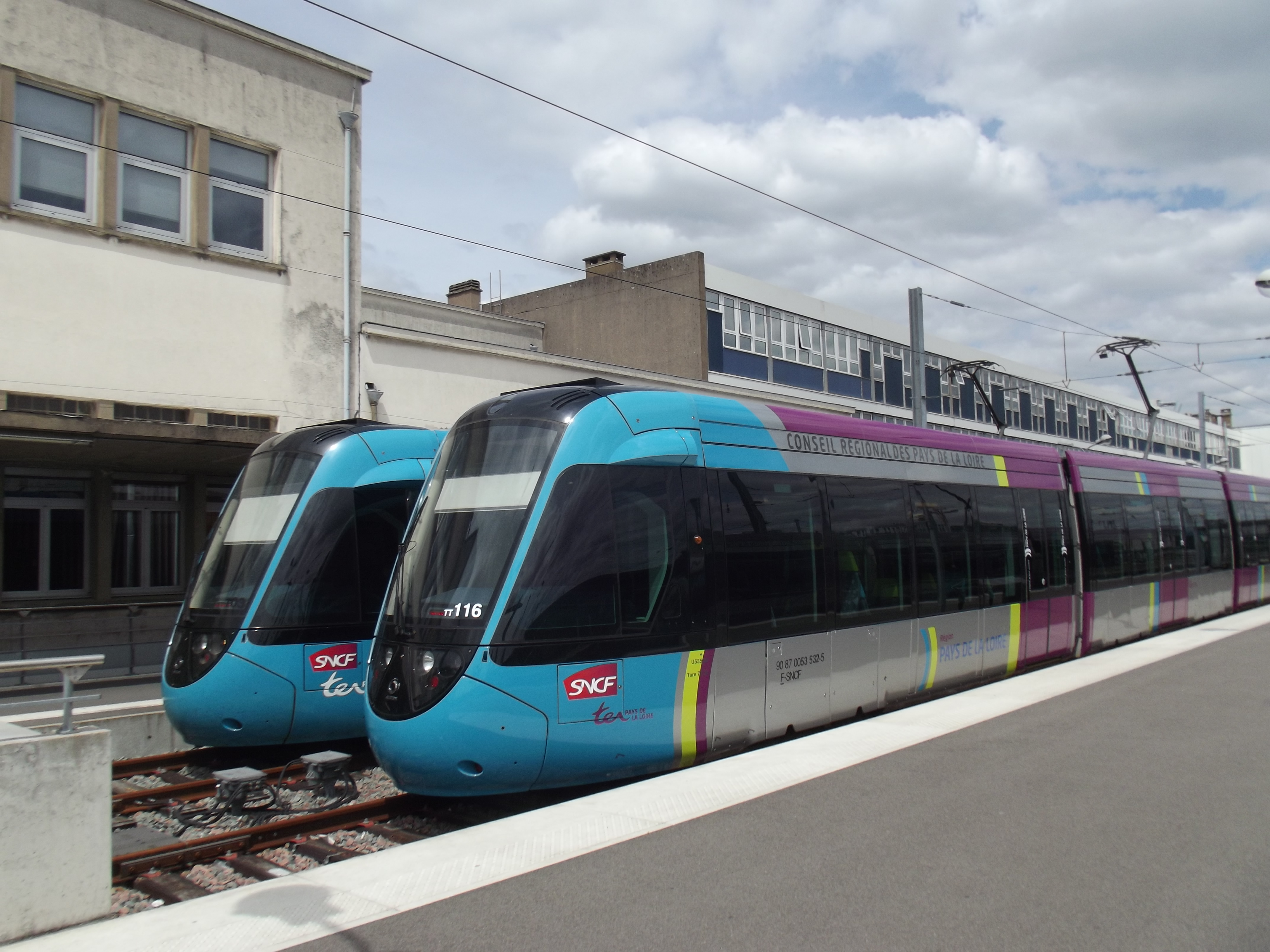 Tram-trein kopstation in Nantes